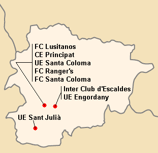 Répartition des clubs en Primera Divisio 2008-2009.